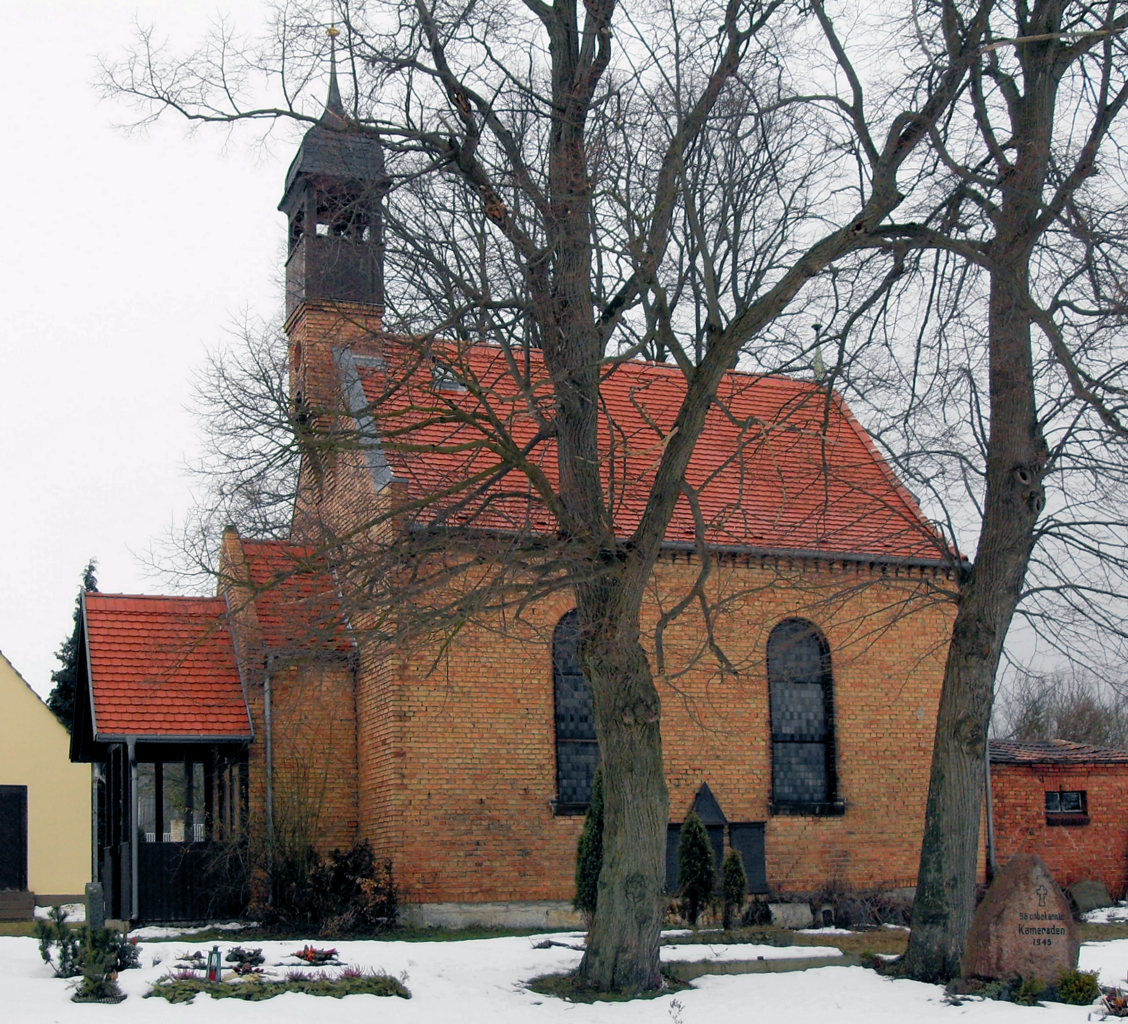 Kirche in Hohenfelde, Ortsteil der Stadt Schwedt/Oder, Deutschland